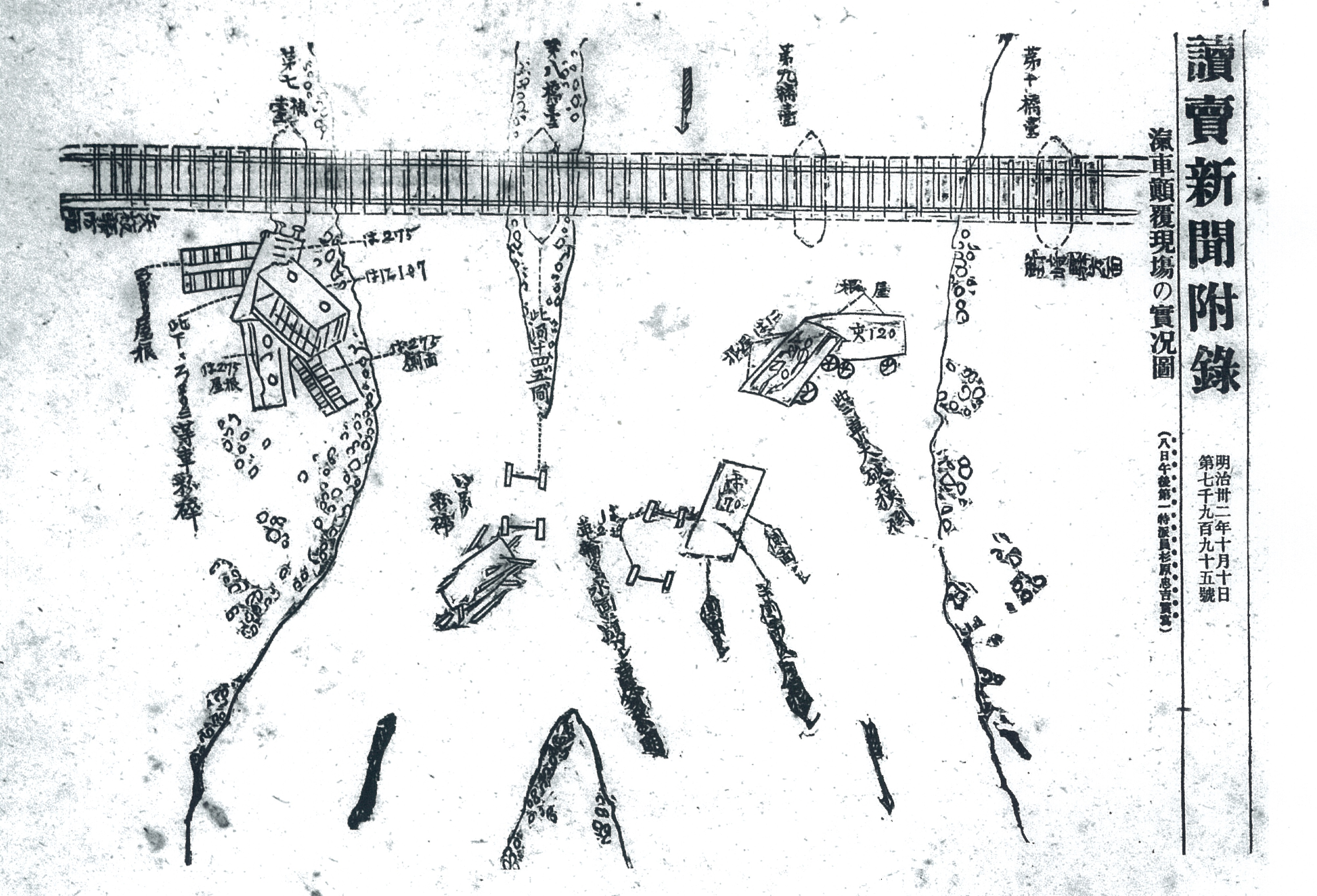 箒川鉄橋列車転落事故実況図 読売新聞 明治32年10月10日付録